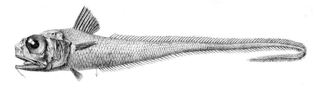 Hymenocephalus italicus